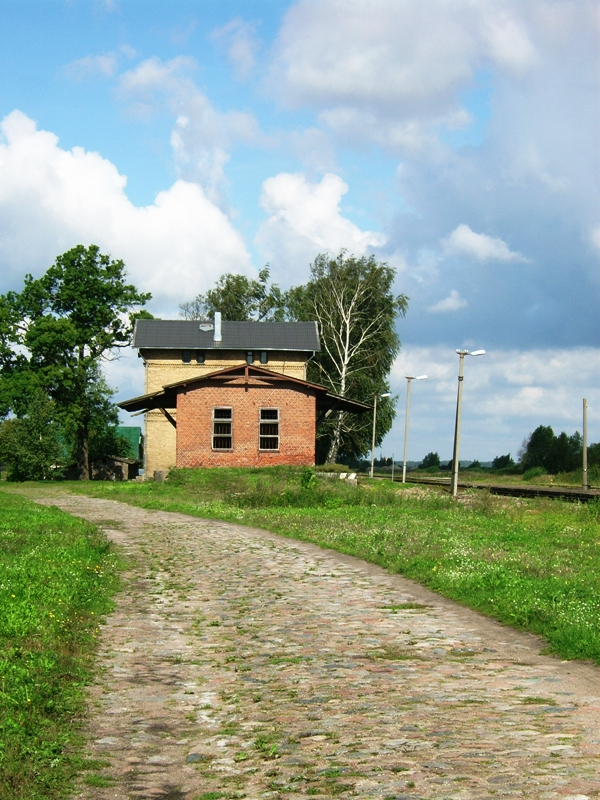 Stoniškių geležinkelio stotis